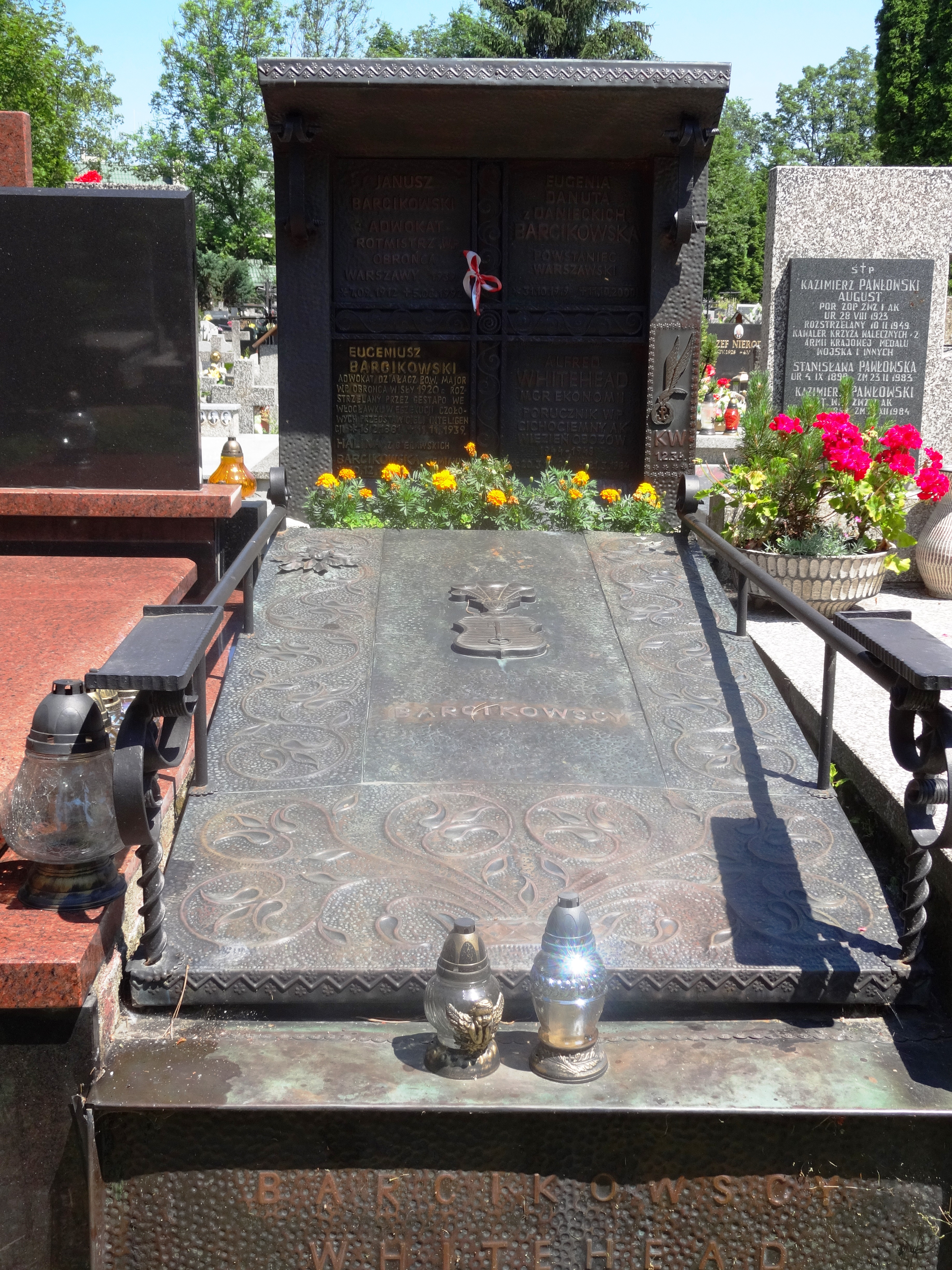 New Cemetery in Zakopane